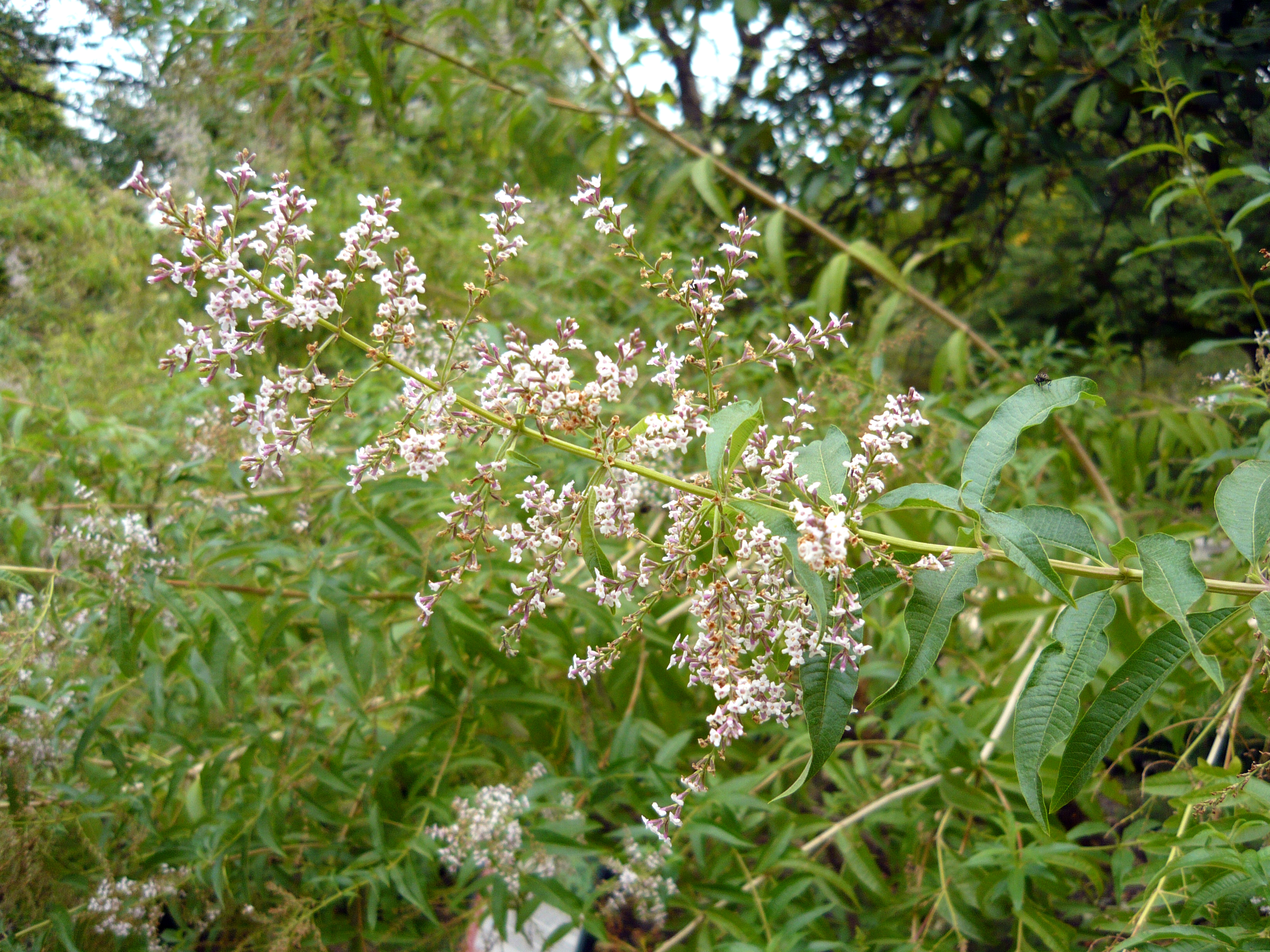 Aloysia citrodora, yerbaluisa. Real Jardín Botánico de Madrid.